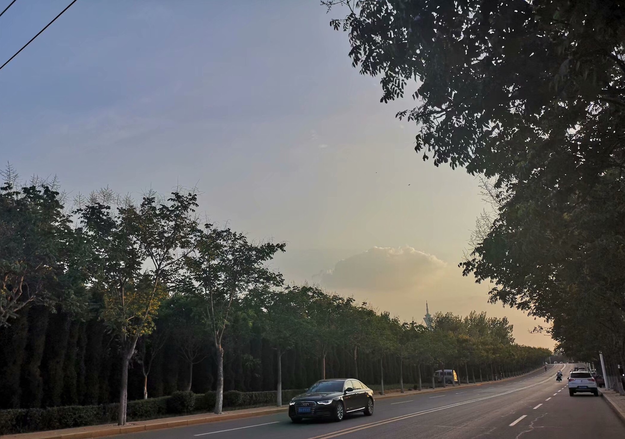 中文（中国大陆）: 肥城市图片